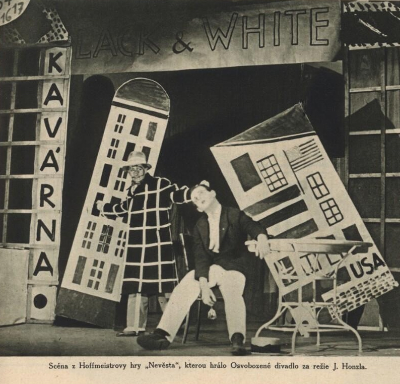 Adolf Hoffmeister: Nevěsta (provedení v Osvobozeném divadle, 1927)